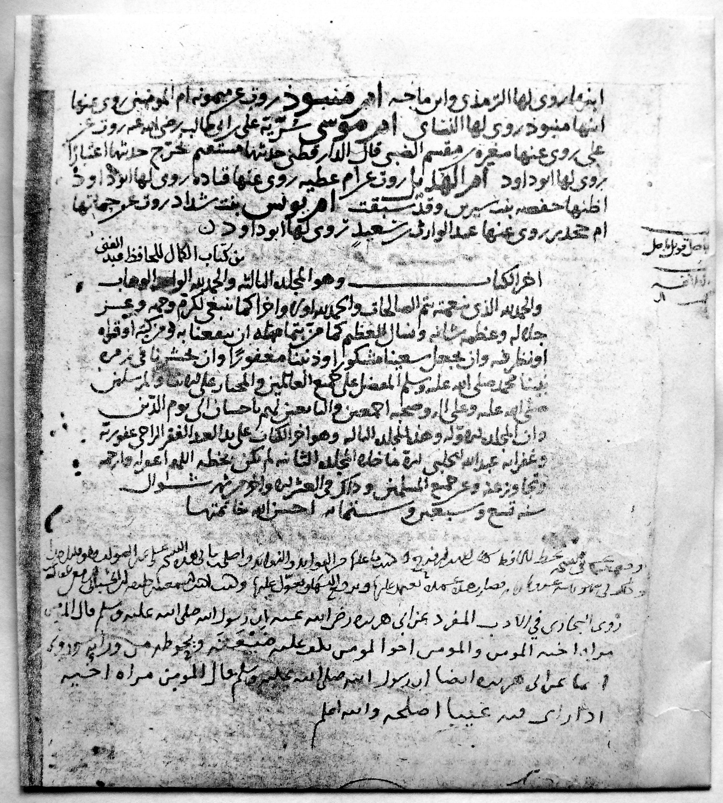 Reproduktion einer Seite aus einer arabischen Handschrift aus dem 13. Jahrhundert